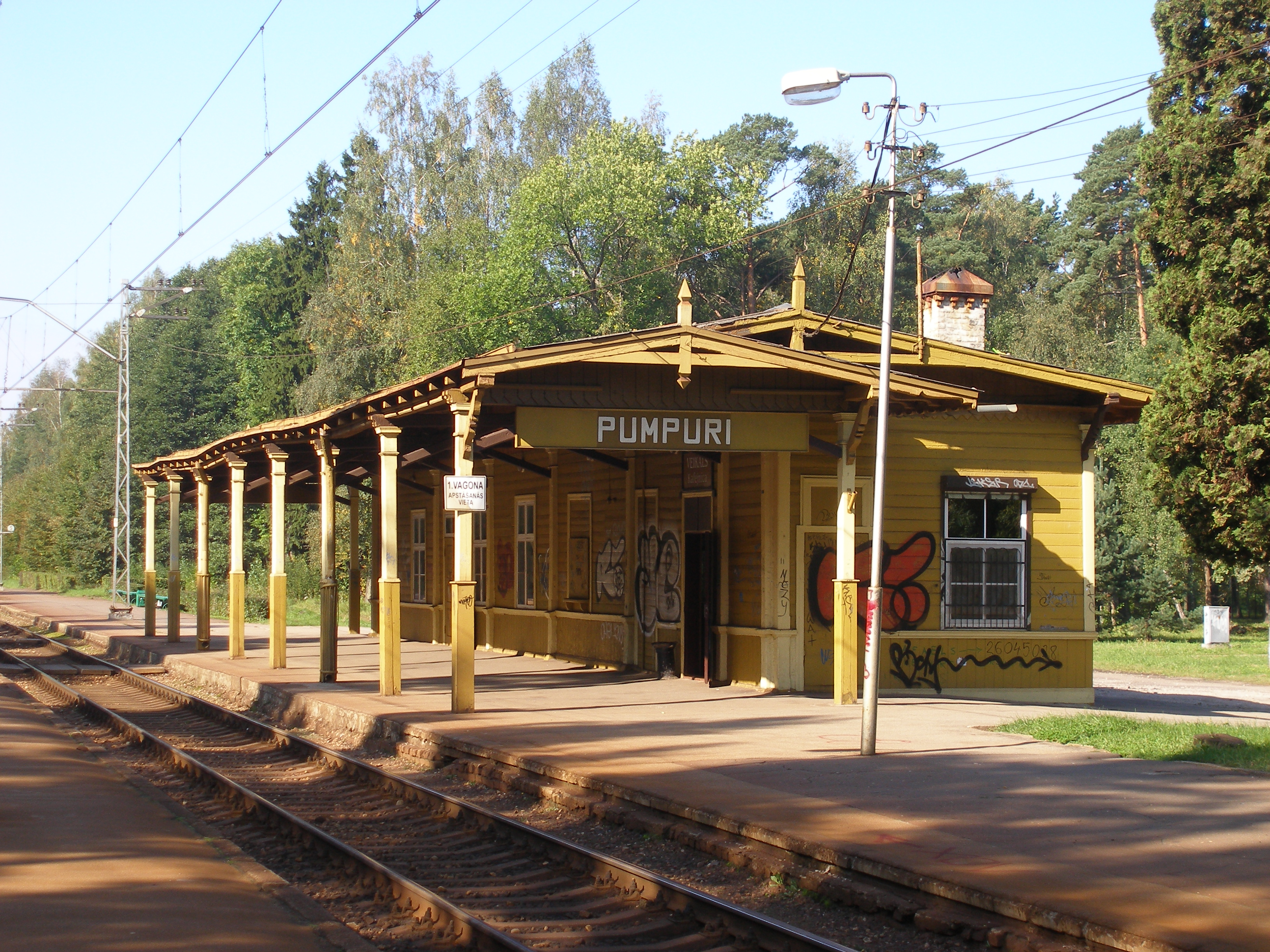 Pumpuru stacijas ēka.